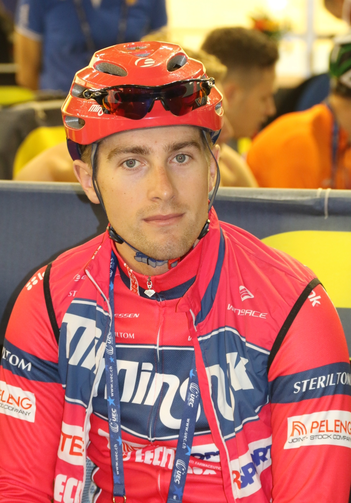 Yauheni Karaliok, weißrussischer Radsportler